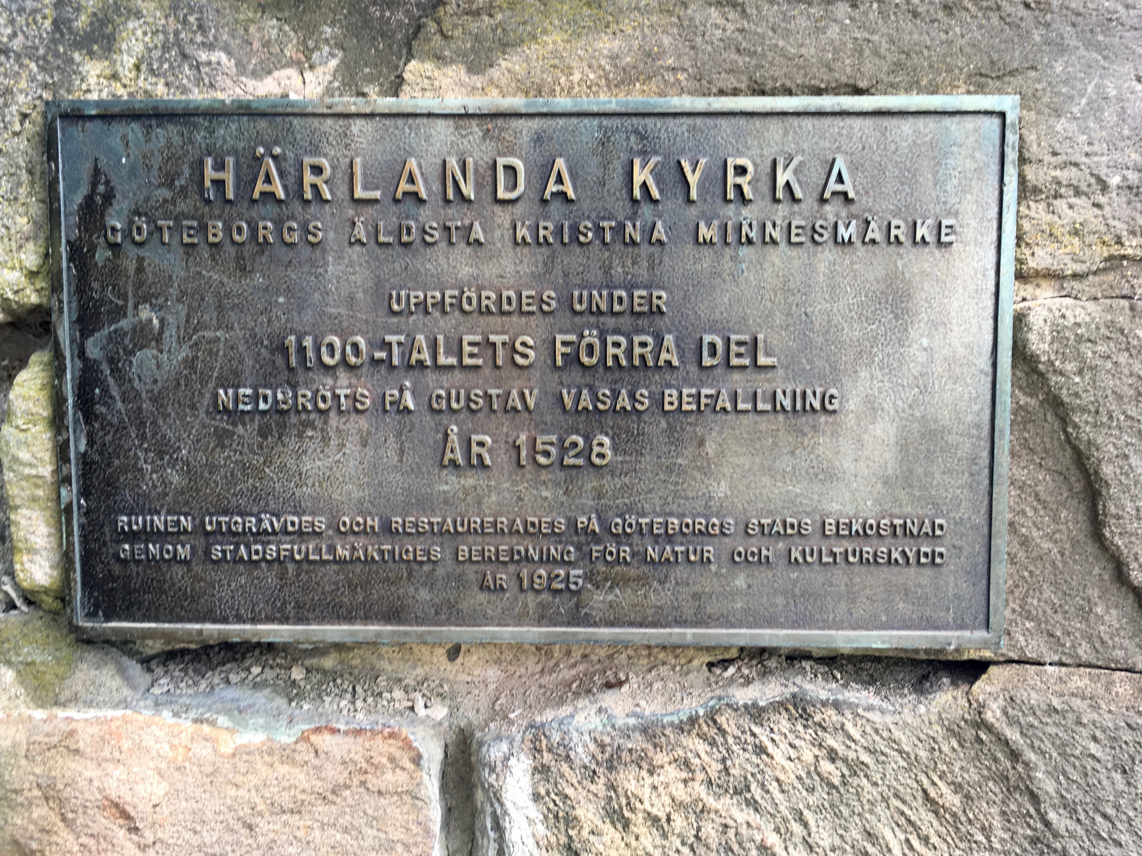 Plakett vid Härlanda kyrkoruin. Den berättar historien om Härlanda gamla kyrka från början av 1100-talet. Kyrkobyggnaden revs 1528 på befallning av kung Gustaf Vasa.